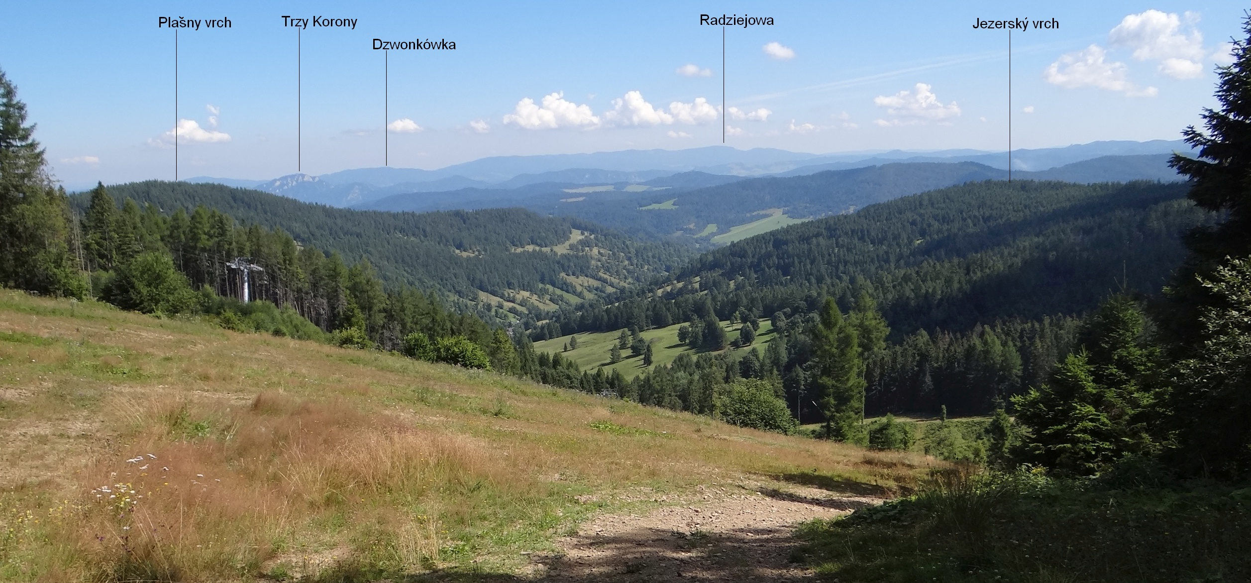 Jezersko, Kežmarok District